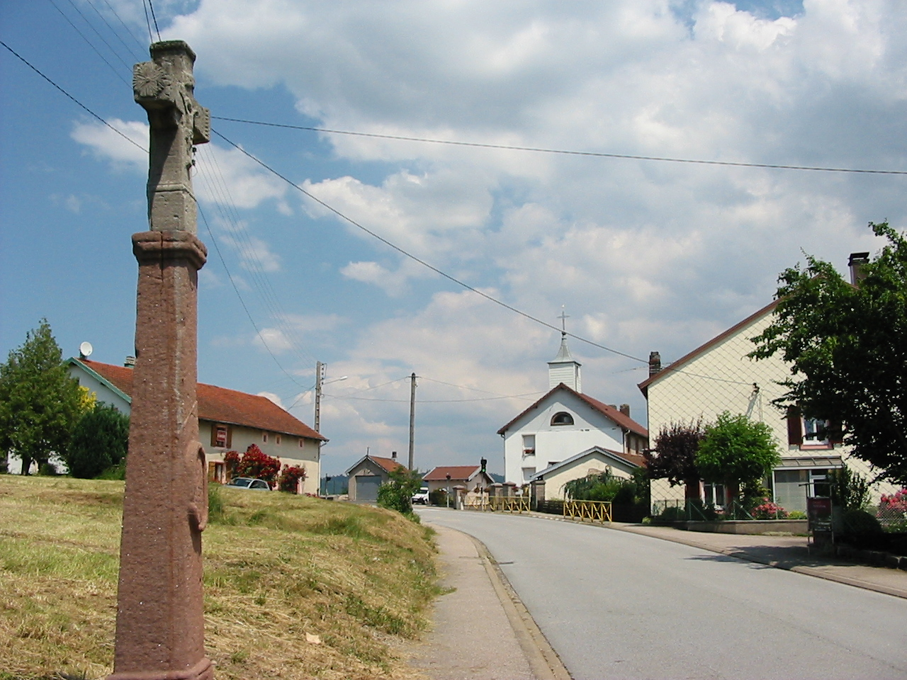 Le centre de la commune des Poulières, dans le département des Vosges. Croix de chemin, mairie.